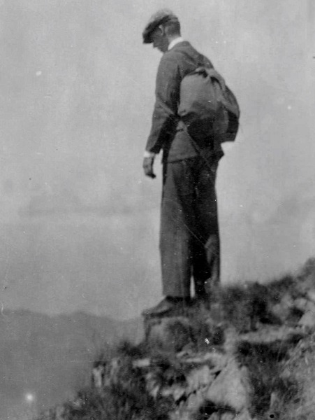 Robert Mulliken am Belchen im Schwarzwald, aufgenommen 1927 von Friedrich Hund